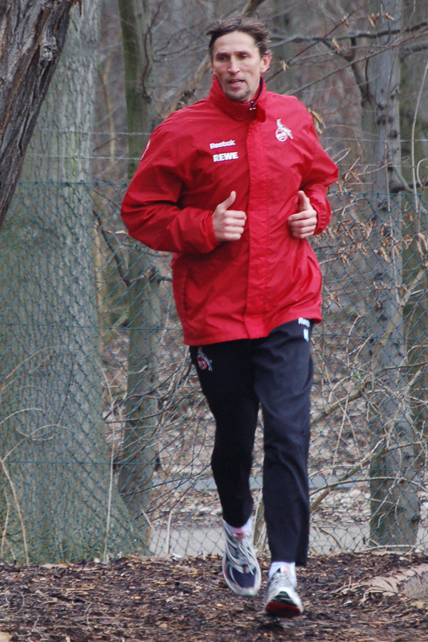 Holger Gehrke